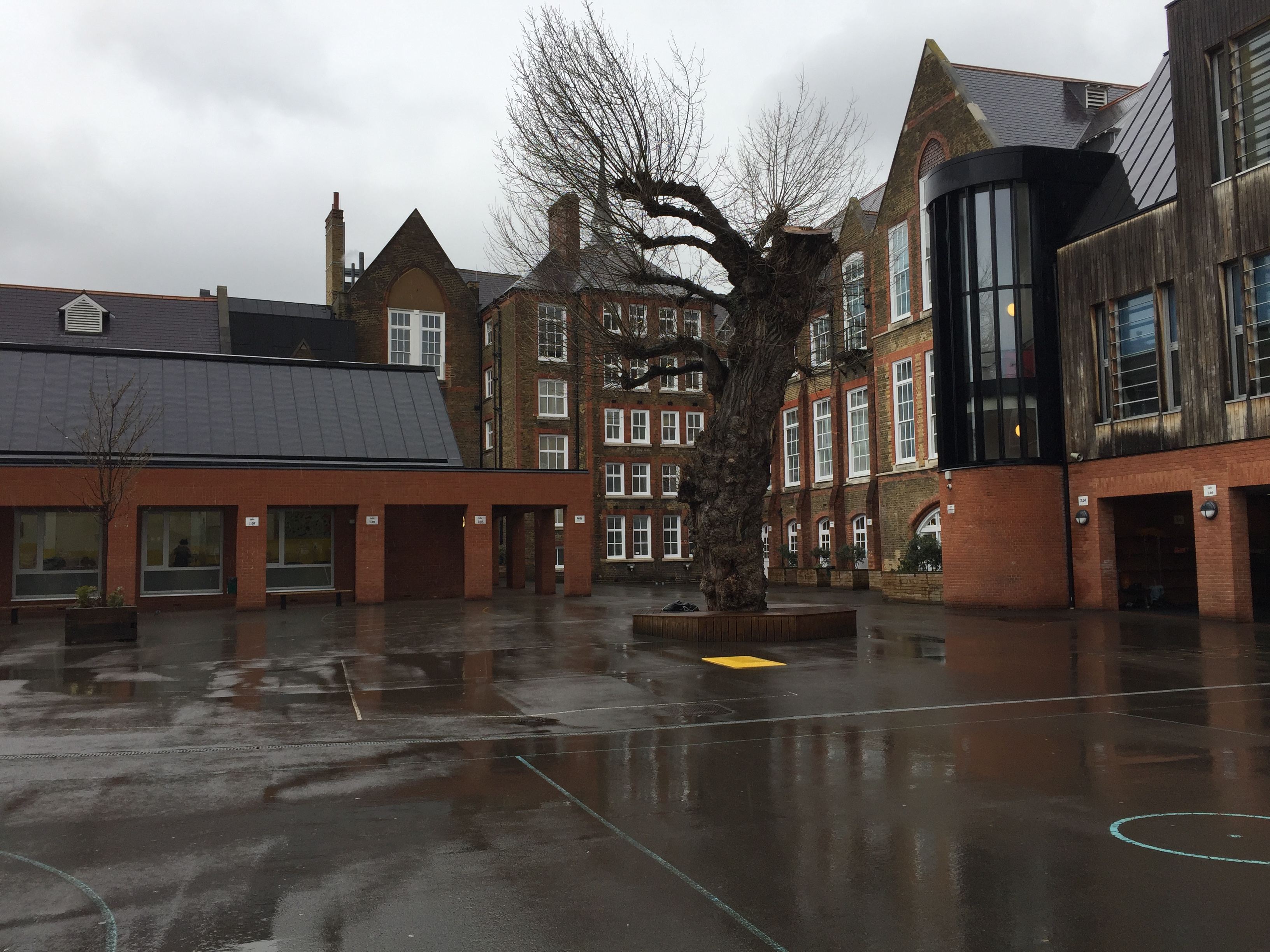 La cours de récréation du Lycée Francais Bilingue de Londres.